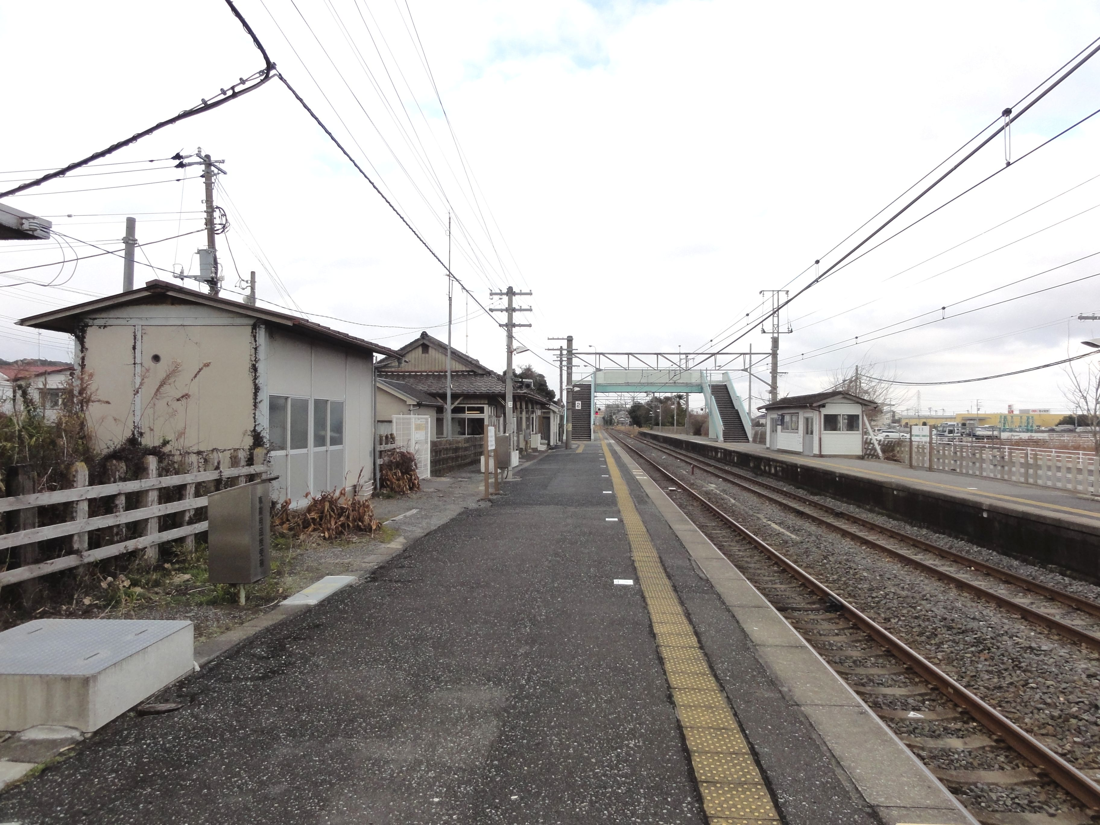 松尾駅ホーム